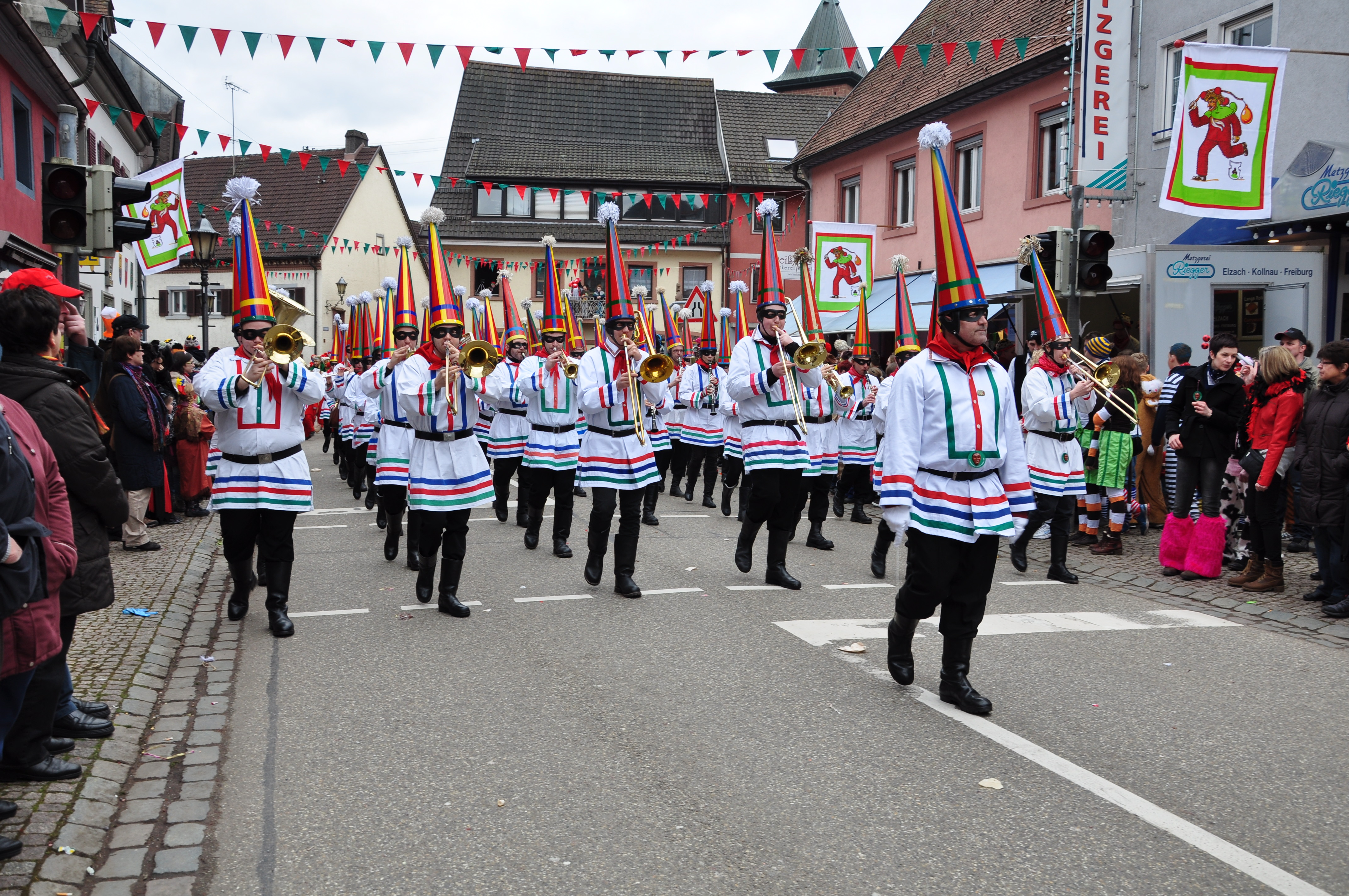 Elzach, Narrenlaufen am Fasnetssonntag-Nachmittag 2014; Stadtmusik im Gewand der Taganrufer